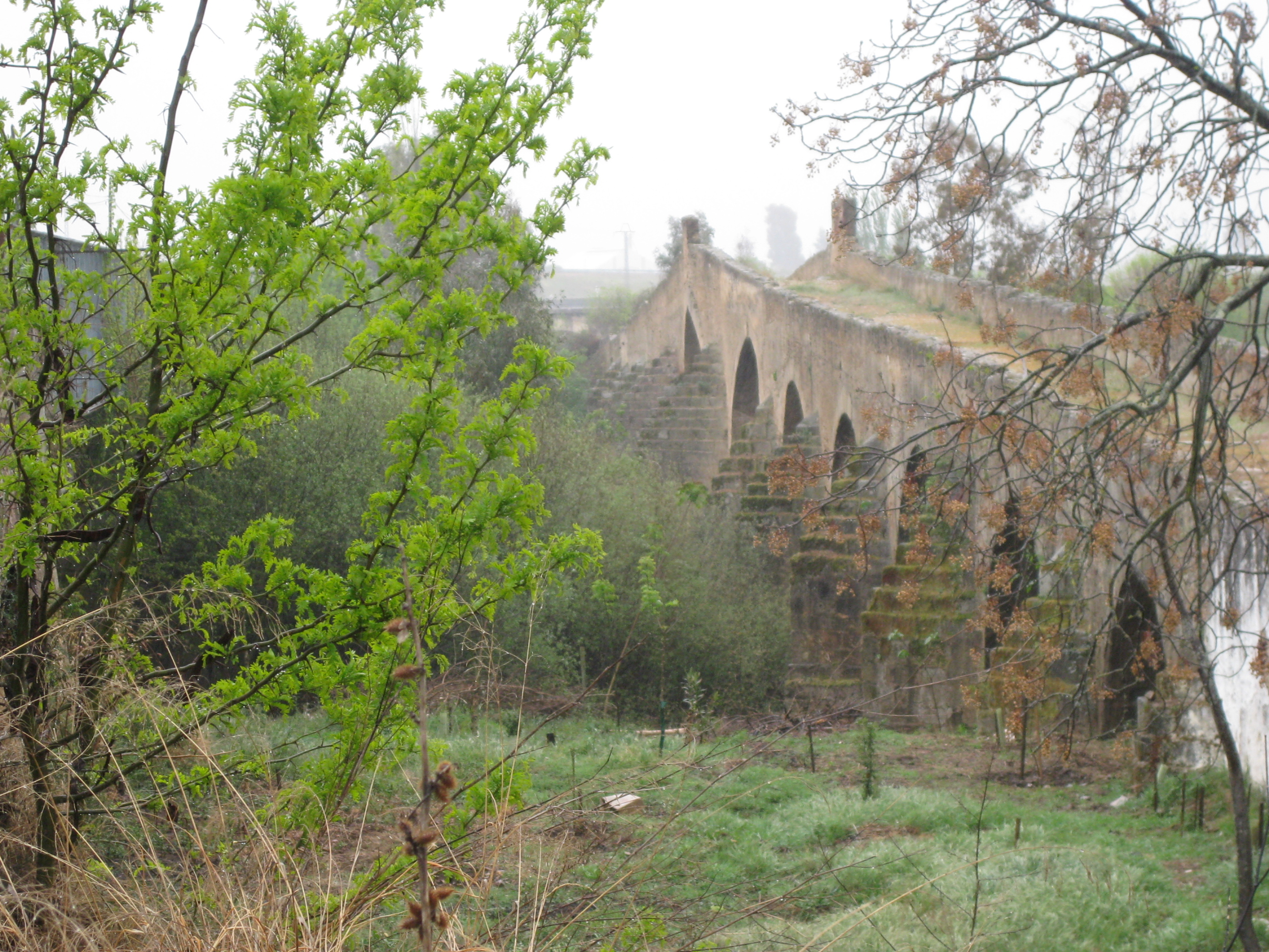 Trabajos de acondicionamiento de las márgenes del río Gévora a su paso por el Puente de Cantillana a cargo de un servidor con herramientas básicas